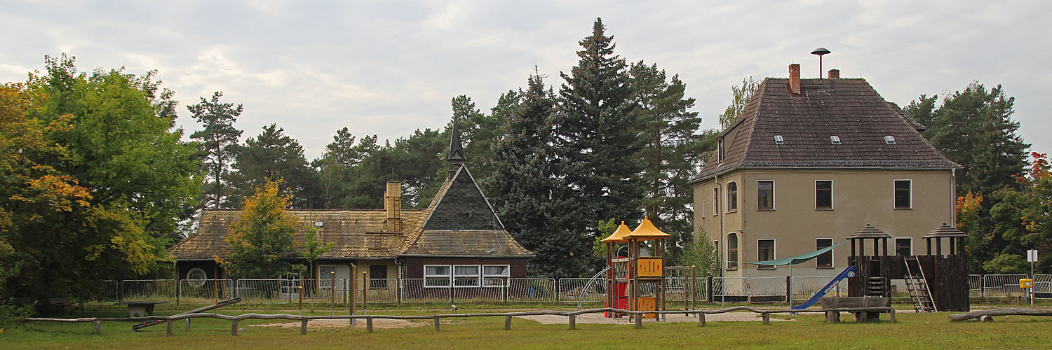 Spielplatz Hammermühle, dahinter die ehemalige Touristenstation mit Teehaus links